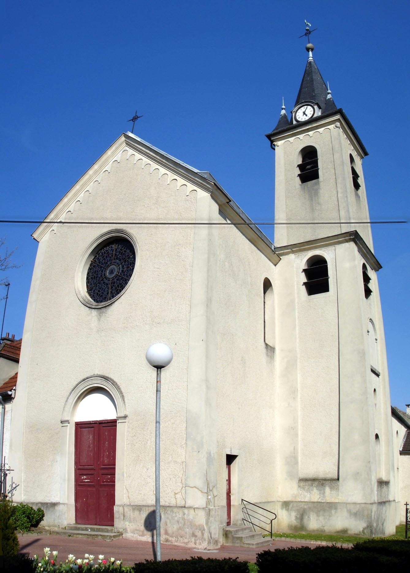 Façade de l'église de Coubron (Seine-Saint-Denis), France